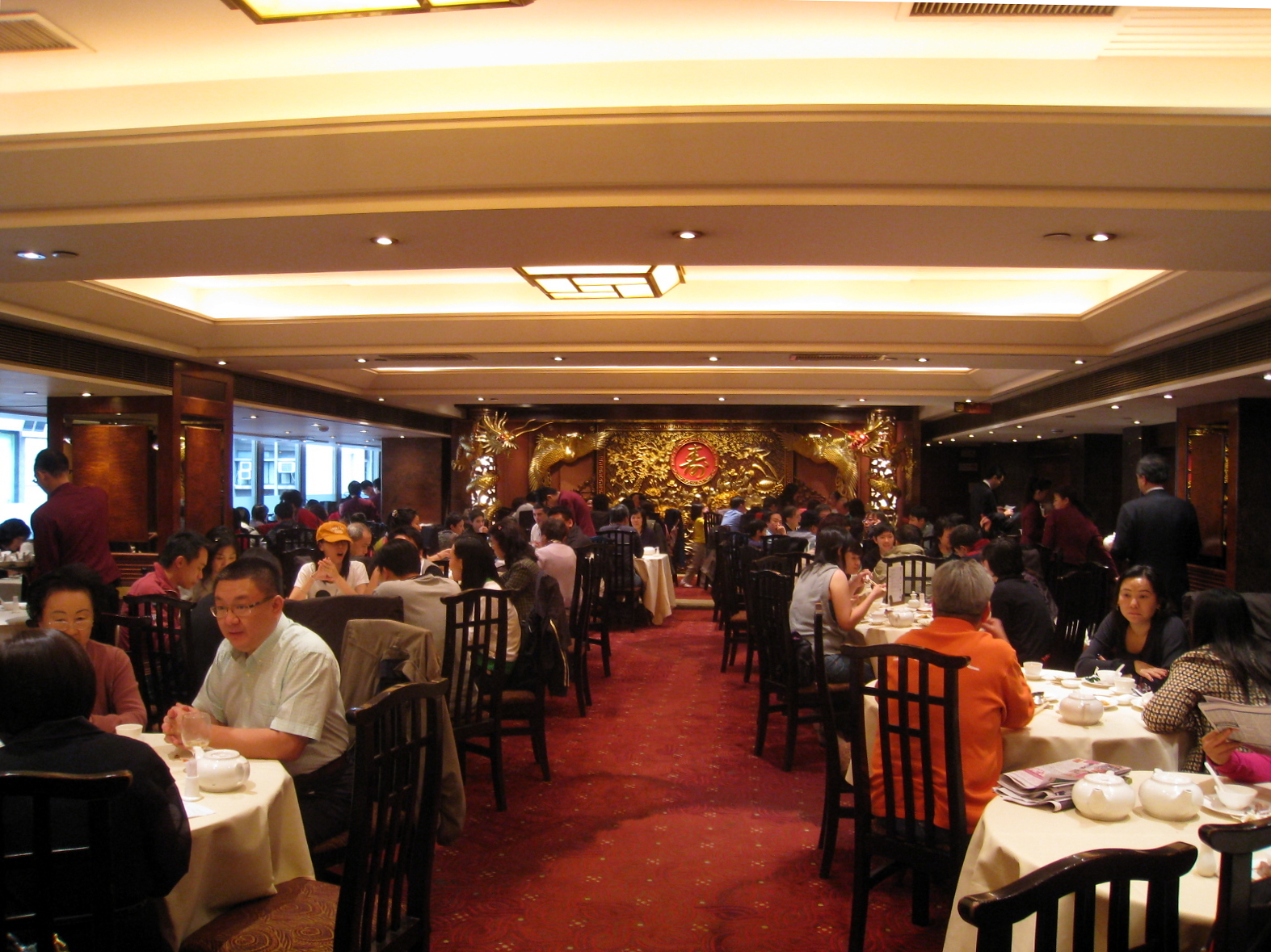 Yung Kee Restaurant Interior 鏞記酒家